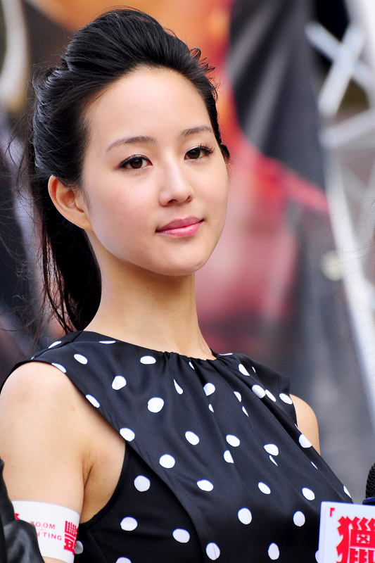 張鈞甯出席電影《獵豔》見面會。